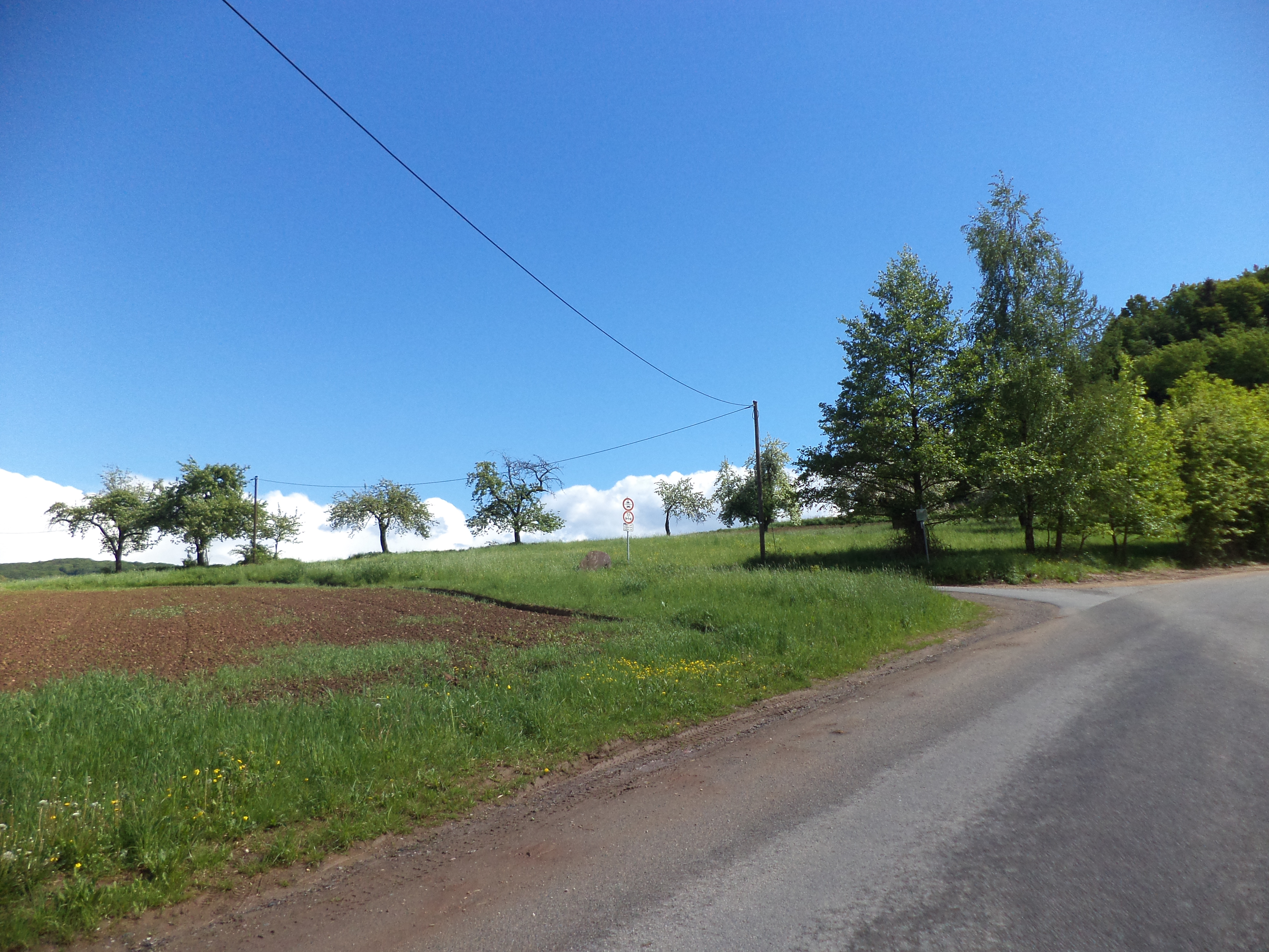 Der vermutliche Standort des verschwundenen Dorfes Wohnstadt bei Mömbris-Brücken